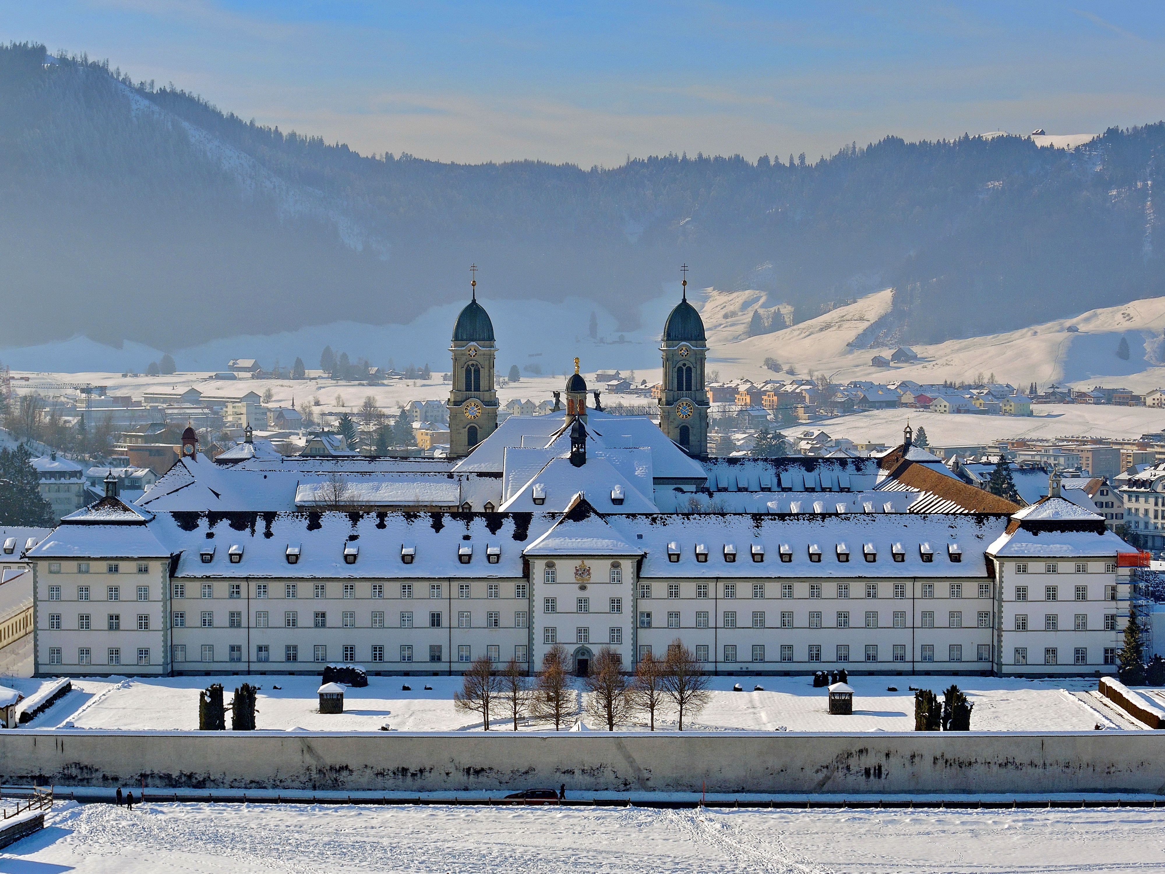 Kloster Einsiedeln in Einsiedeln (Switzerland)